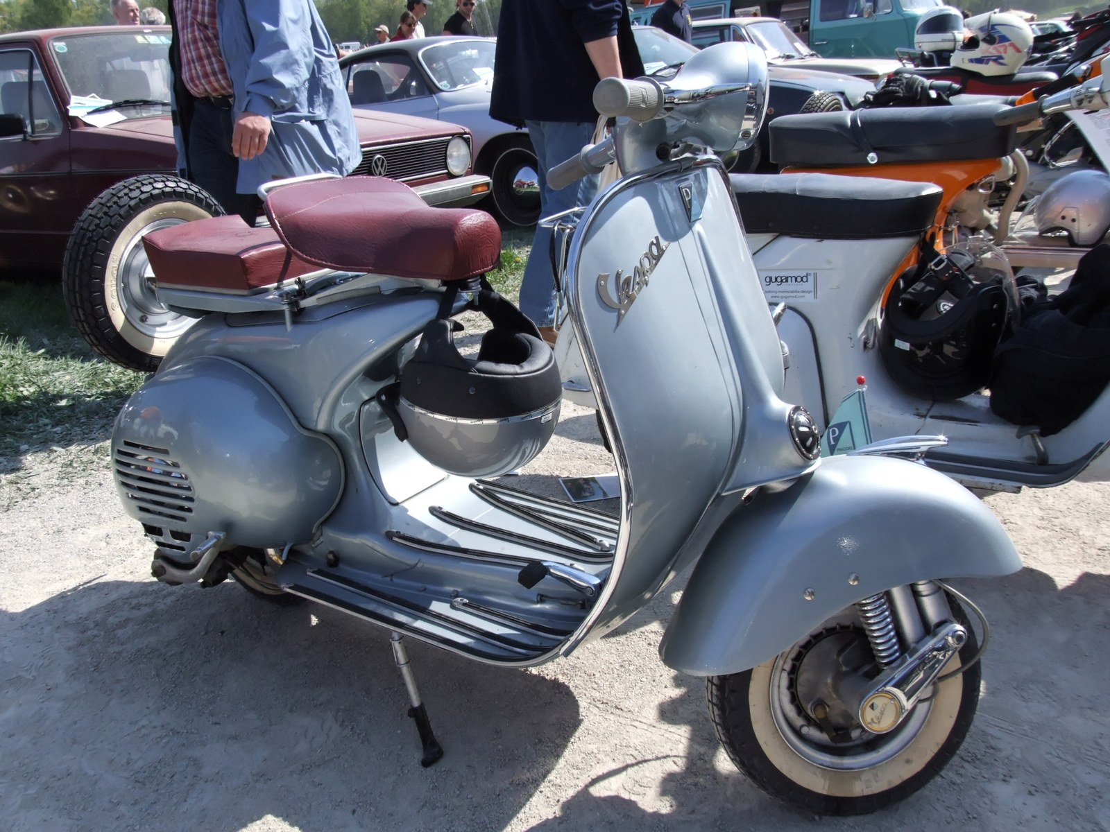 Quelle: selbst fotografiert, 04/2007 Fotograf: Späth Chr.